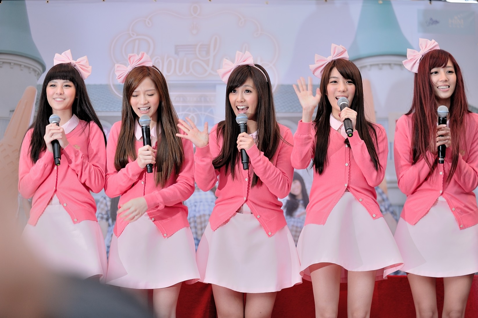 中文（台灣）: 台灣最新純愛系女子團體-PopU Lady